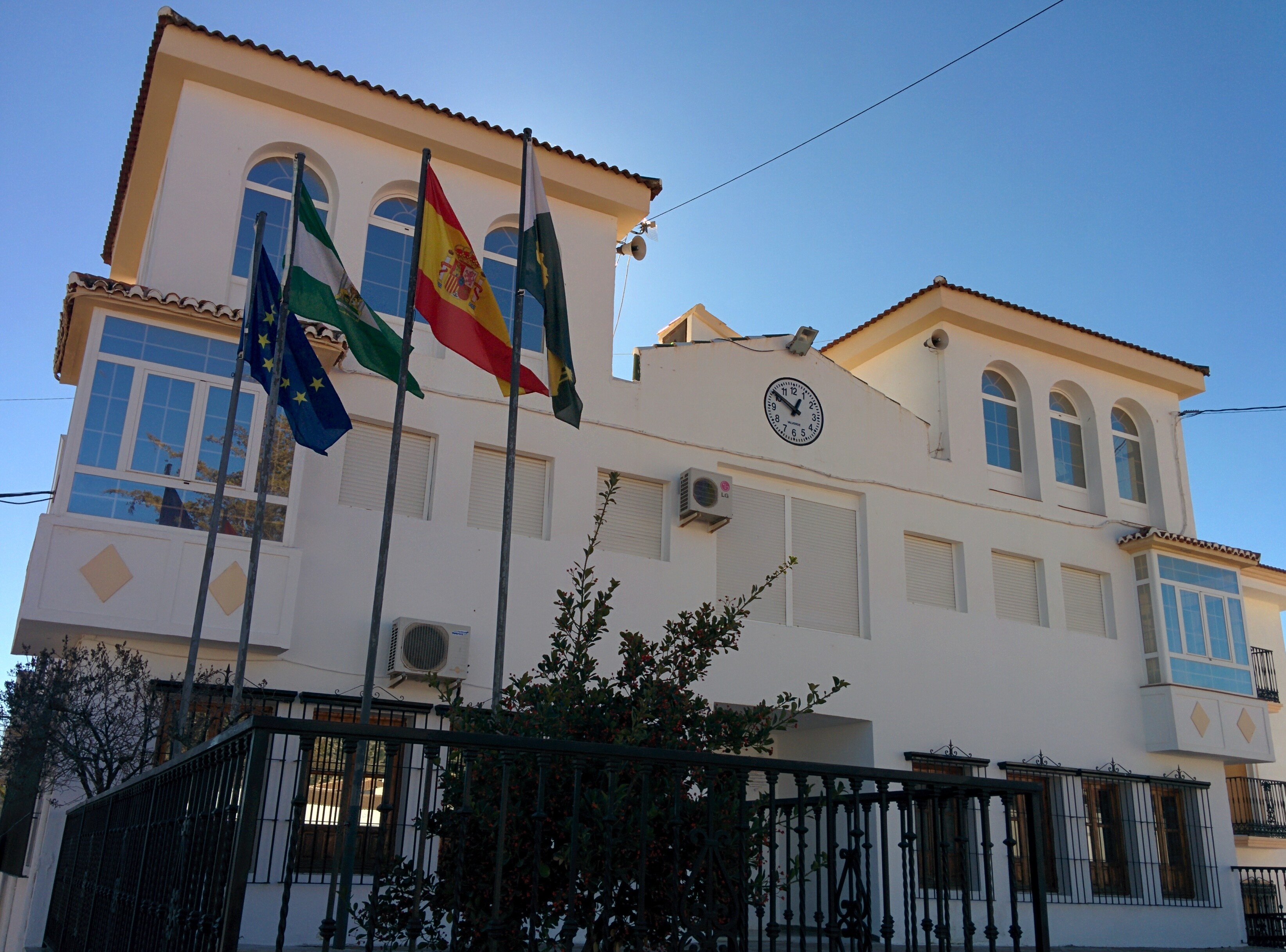 Casa consistorial de Montillana (Granada, España).